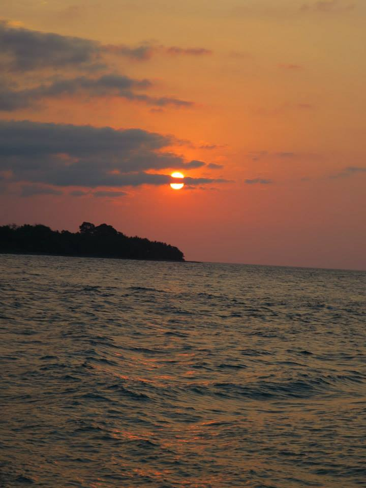 Liquiçá